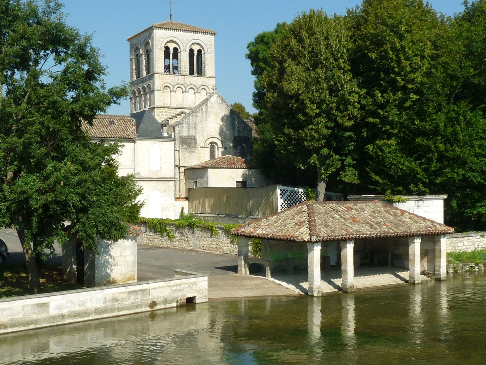 église de Magnac-sur-Touvre (16), France